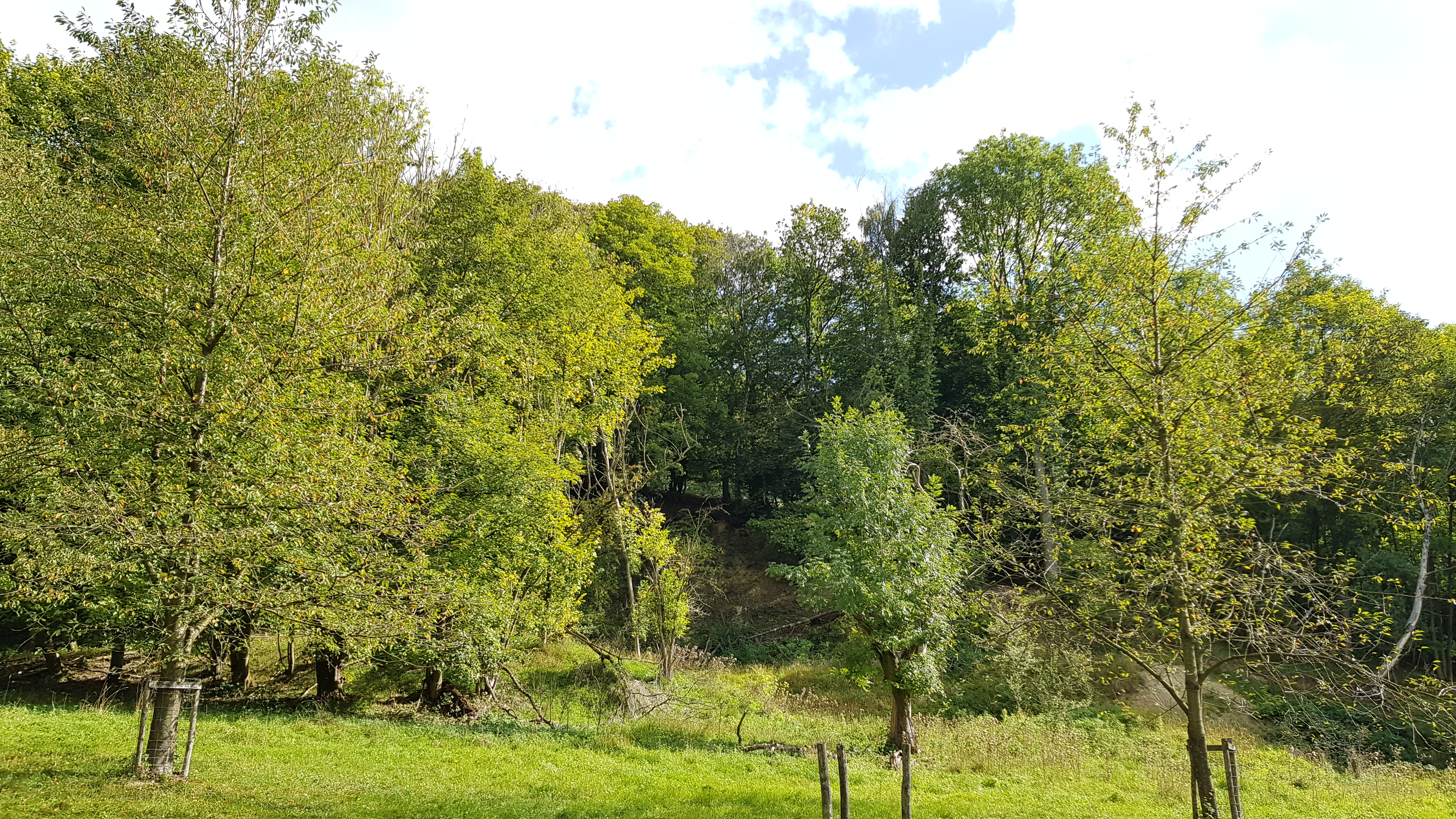 Groeve Habets, Beutenaken, Gulpen-Wittem, Nederland